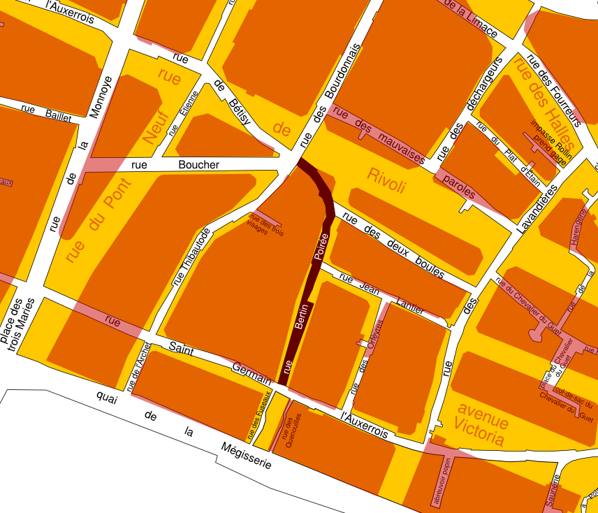 La rue Bertin-Poirée à Paris en 1793-1795 (plan des sections, feuille 34) avec, en superposition, le tracé contemporain (2014) des rues